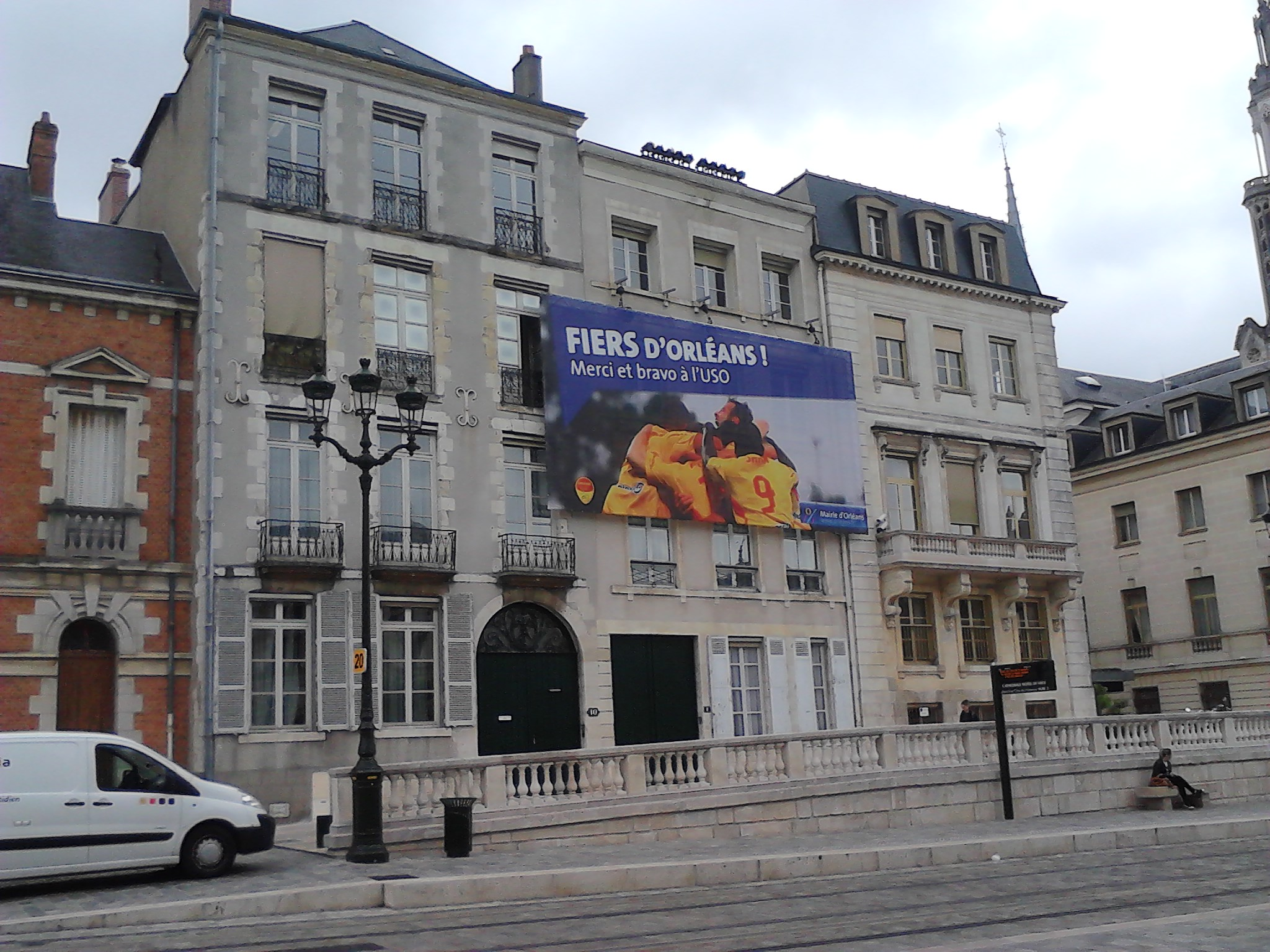 La mairie salue la montée en Ligue 2 du club de football d'Orléans l'USO.